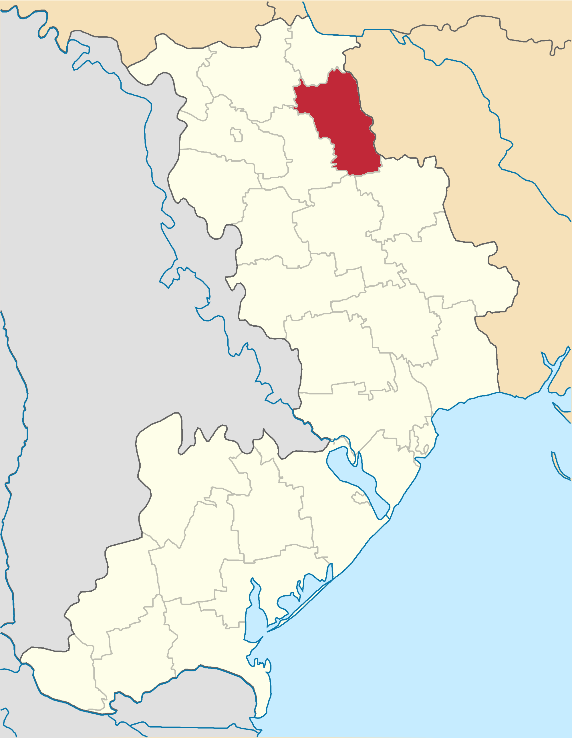 Lyubashivskyi-Raion map